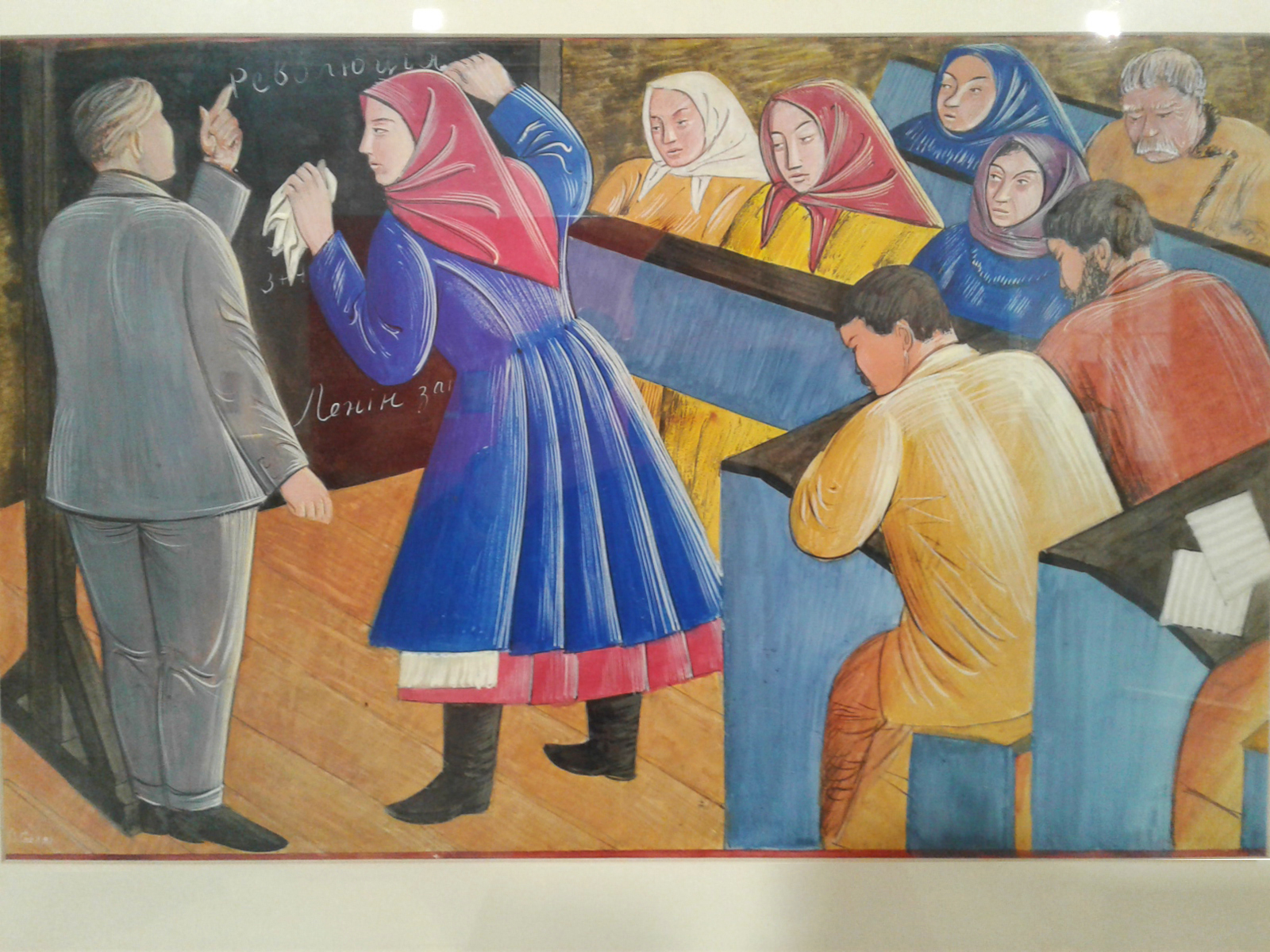 Седляр Василь Теофанович. «У школі лікнепу». Межа 1920–1930-х рр. Папір, темпера Національний художній музей України